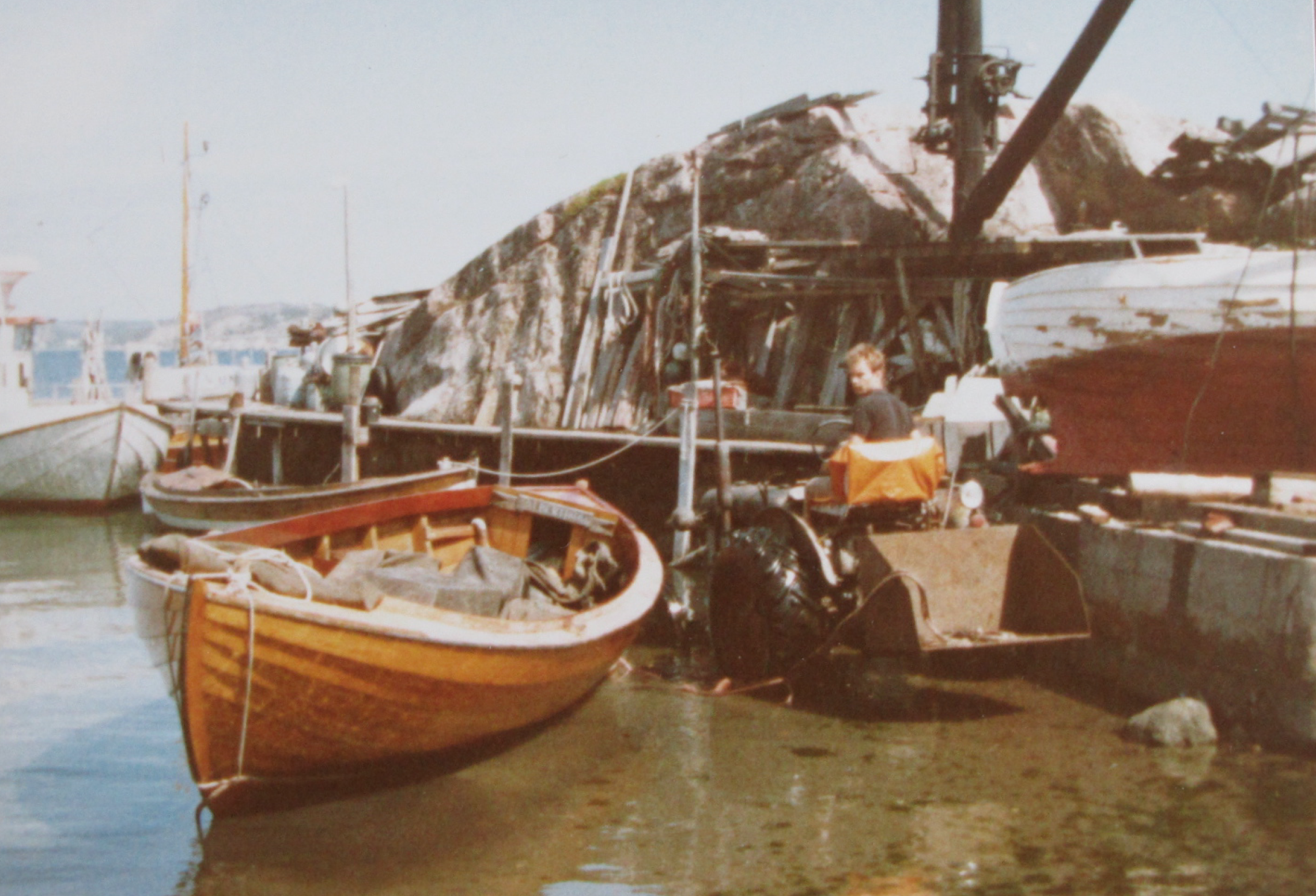 Småbåtsvarvet på Musö 1973